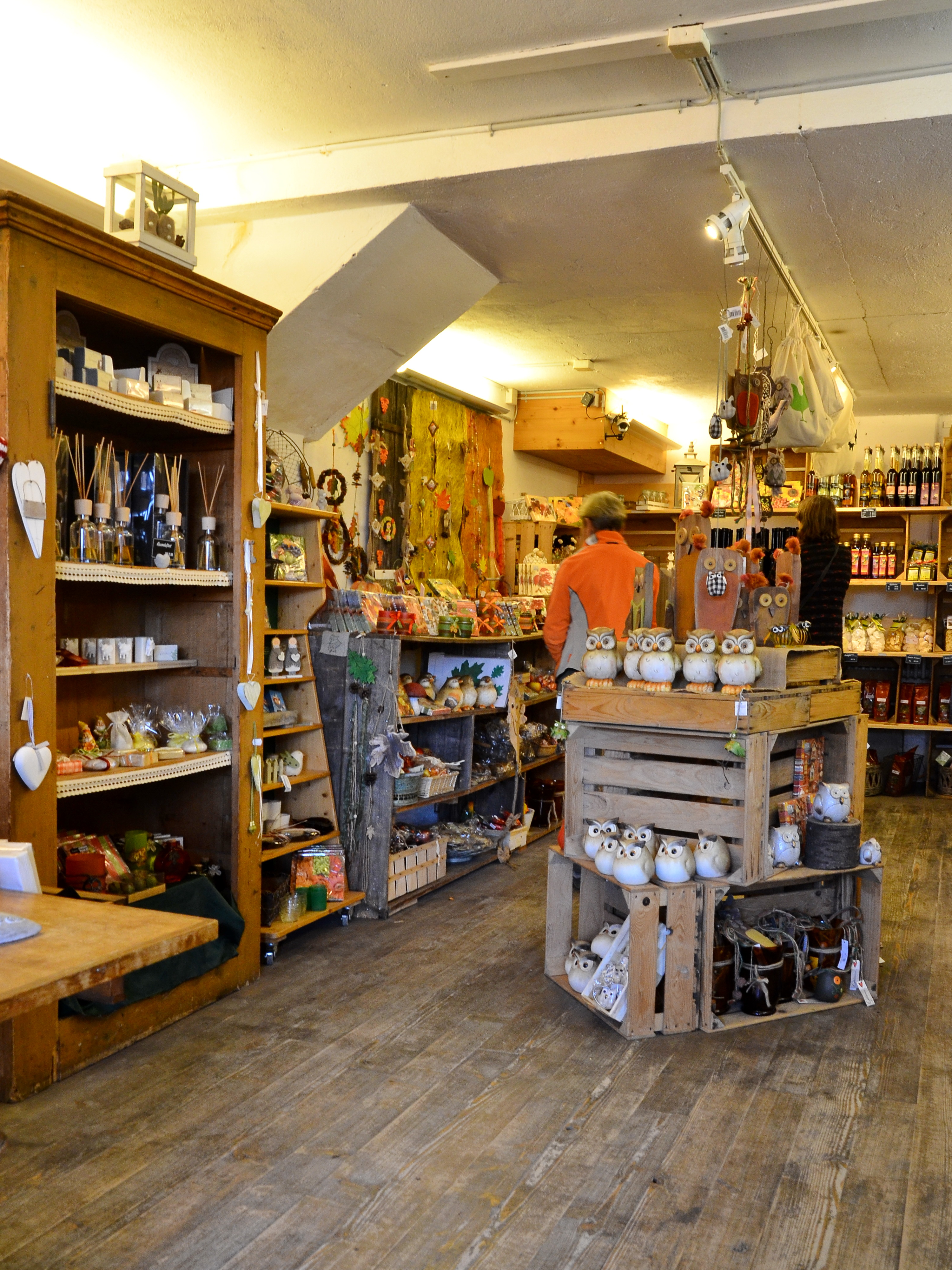 Kürbisausstellung (pumpkin festival), Jucker Farm (Juchhof) in Seegräben (Switzerland)